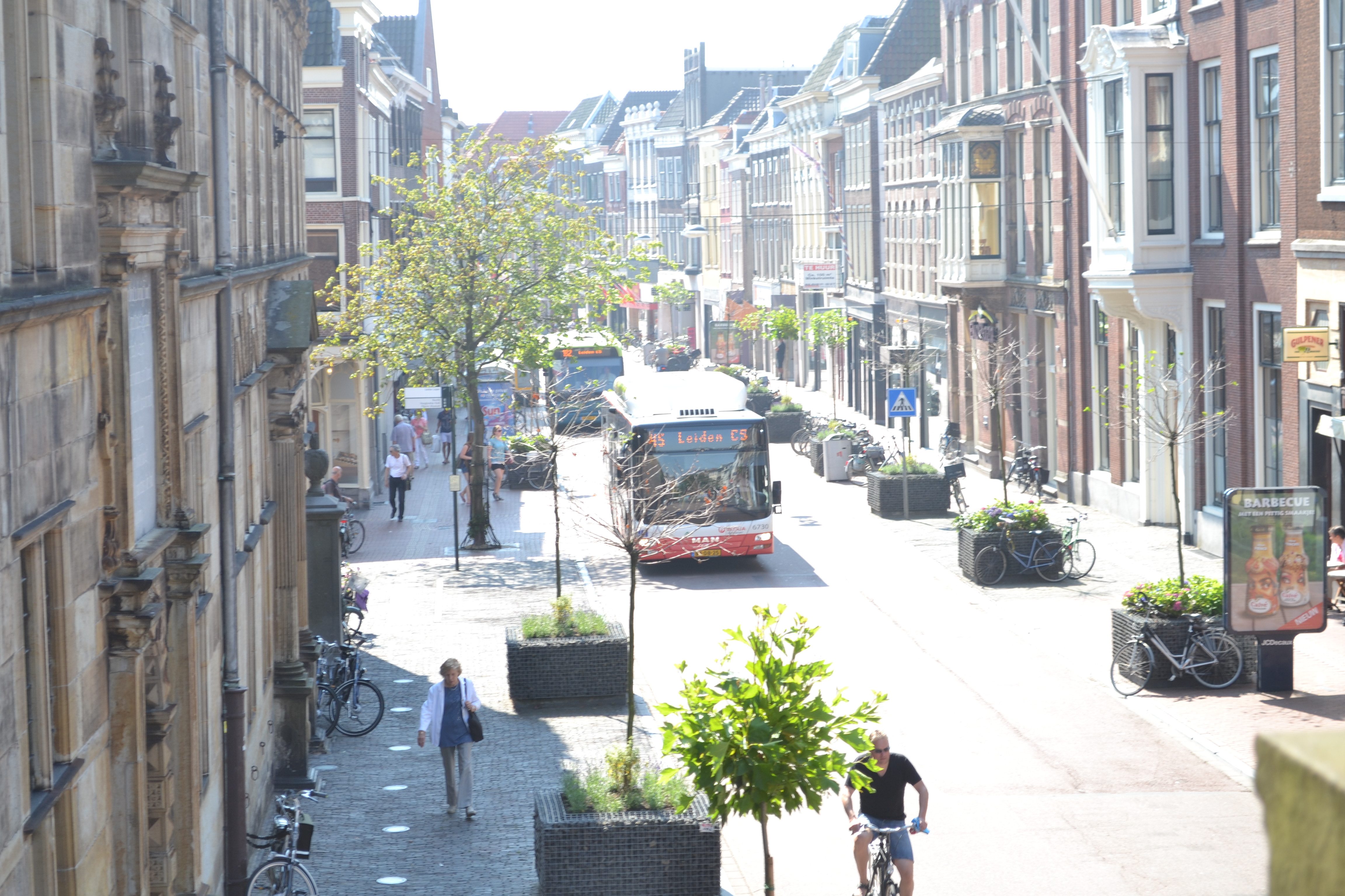 Twee bussen, een van Veolia en een van Connexxion, in de Breestraat in Leiden.